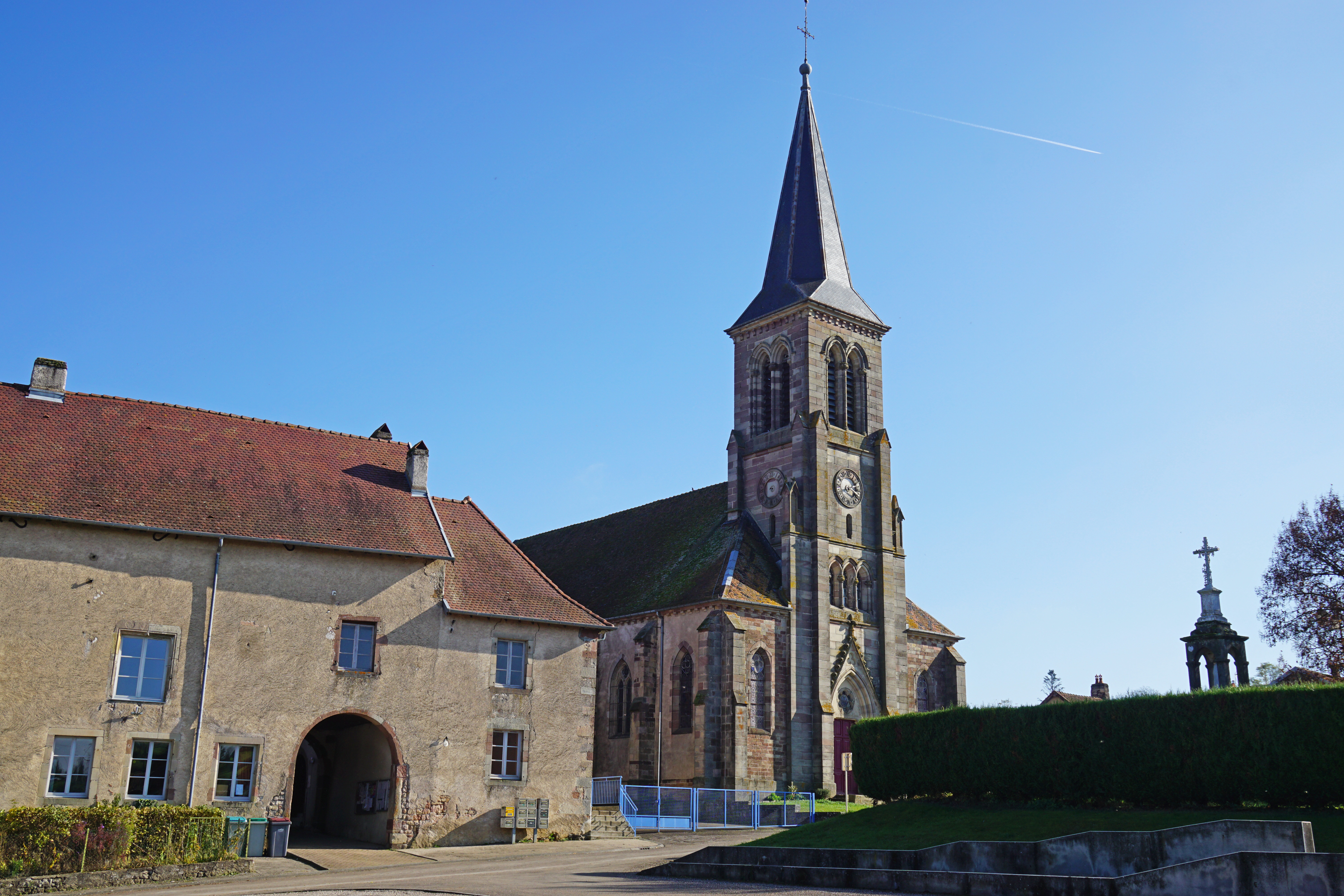 La mairie et l'église de La Villedieu-en-Fontenette.